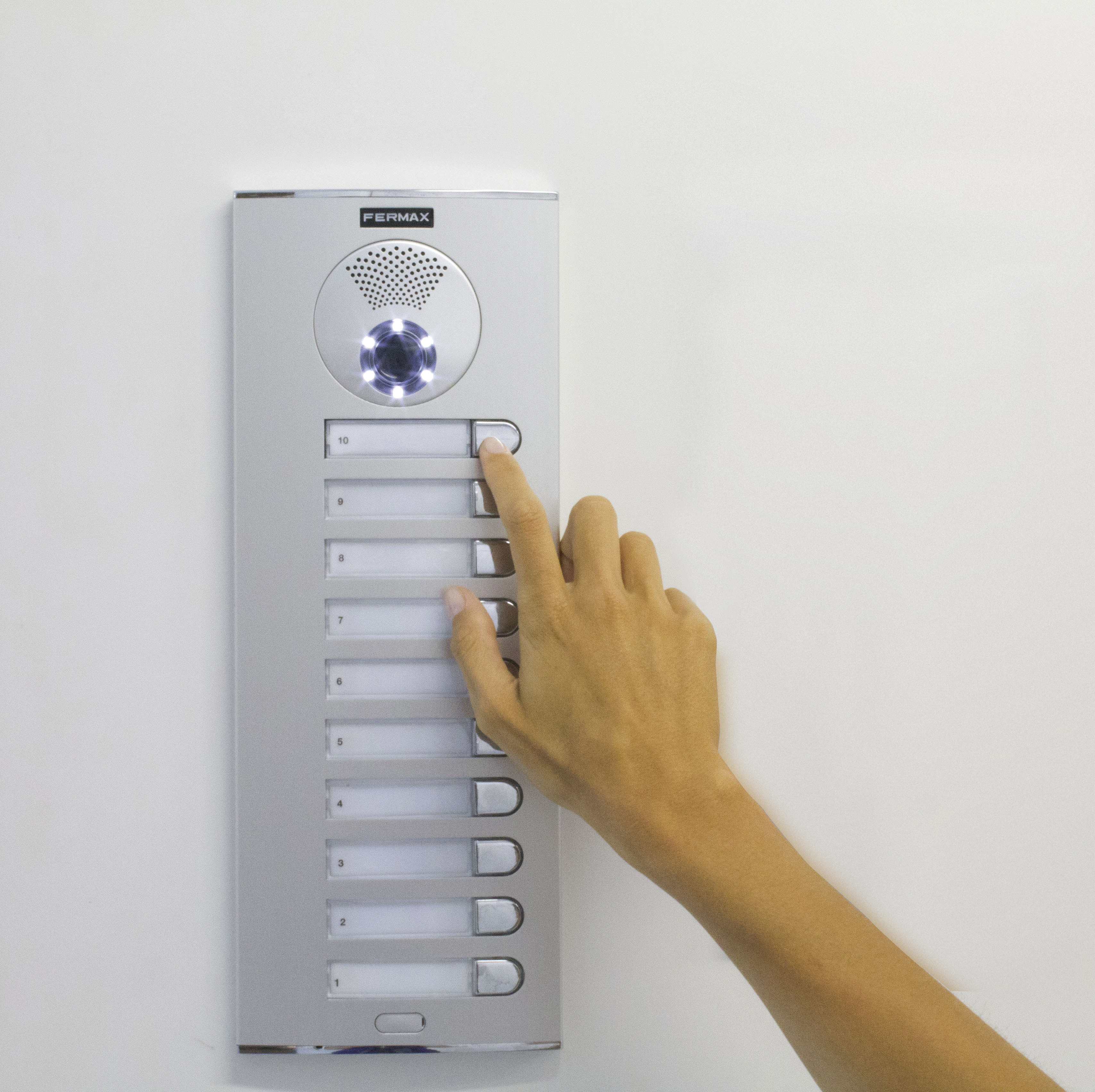 Una persona llama a una vivienda utilizando la placa exterior de un videoportero